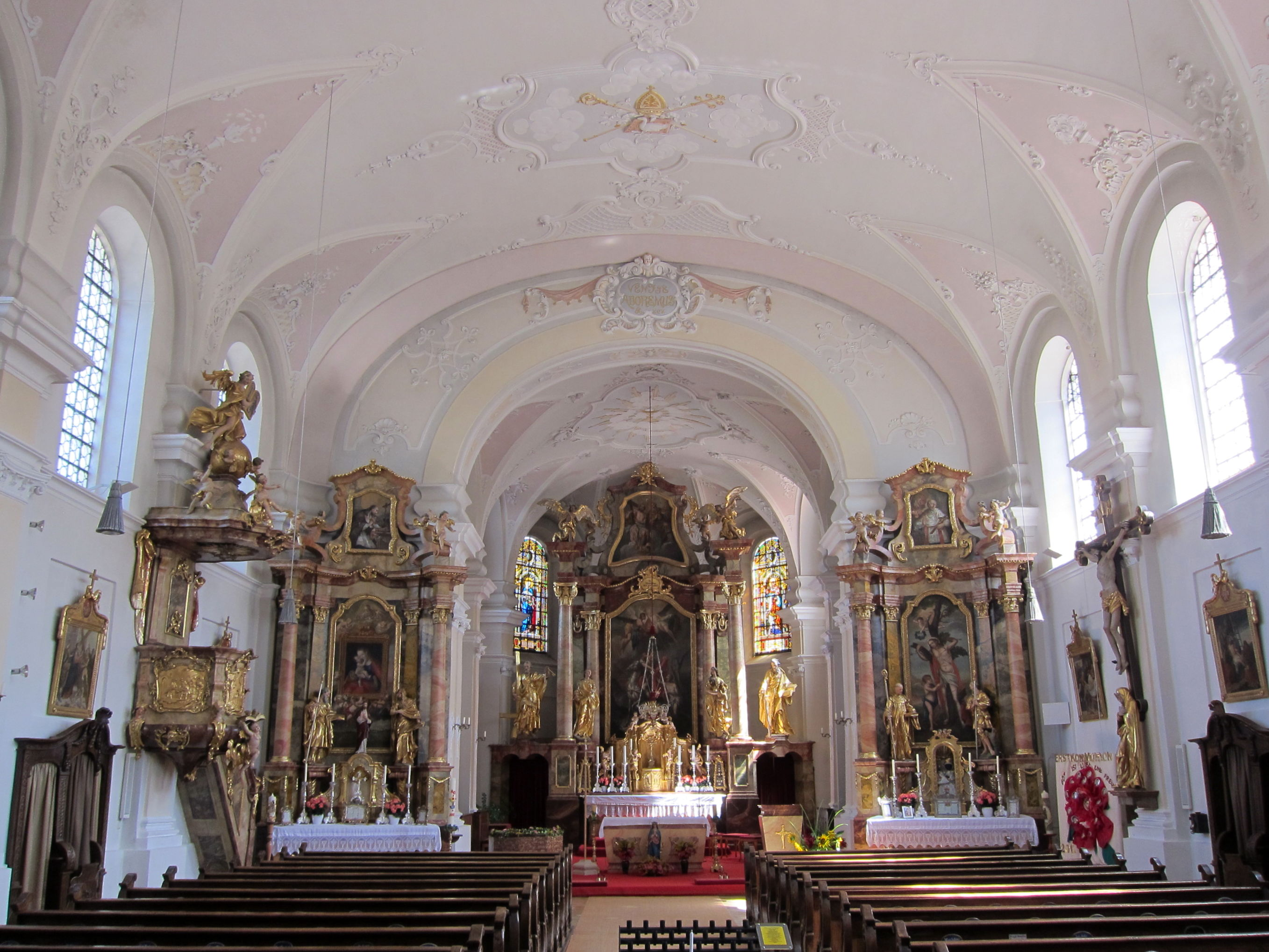 Langenpreising; Katholische Pfarrkirche St. Martin, Inneres.